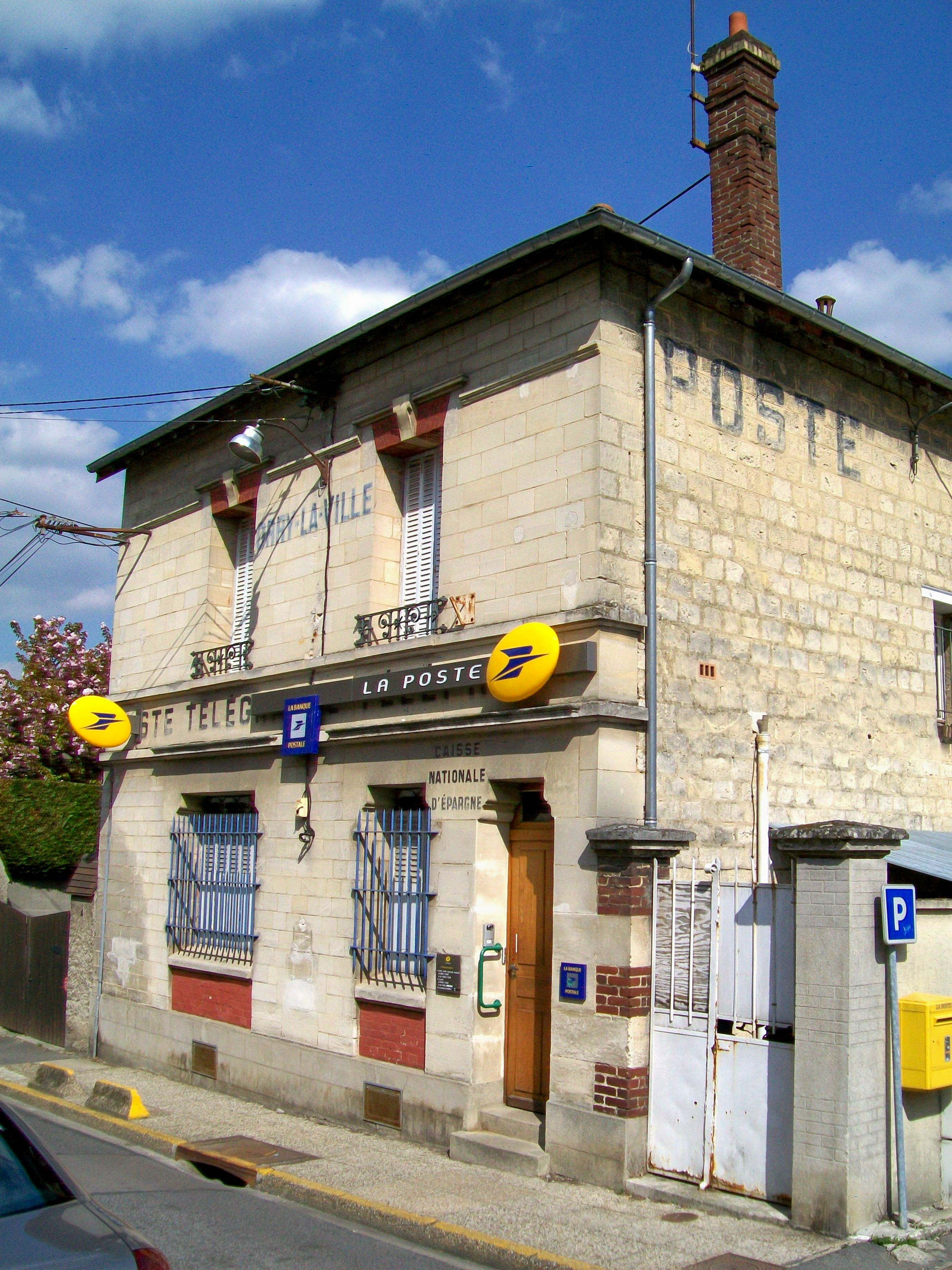 La poste, rue de Montgrésin.